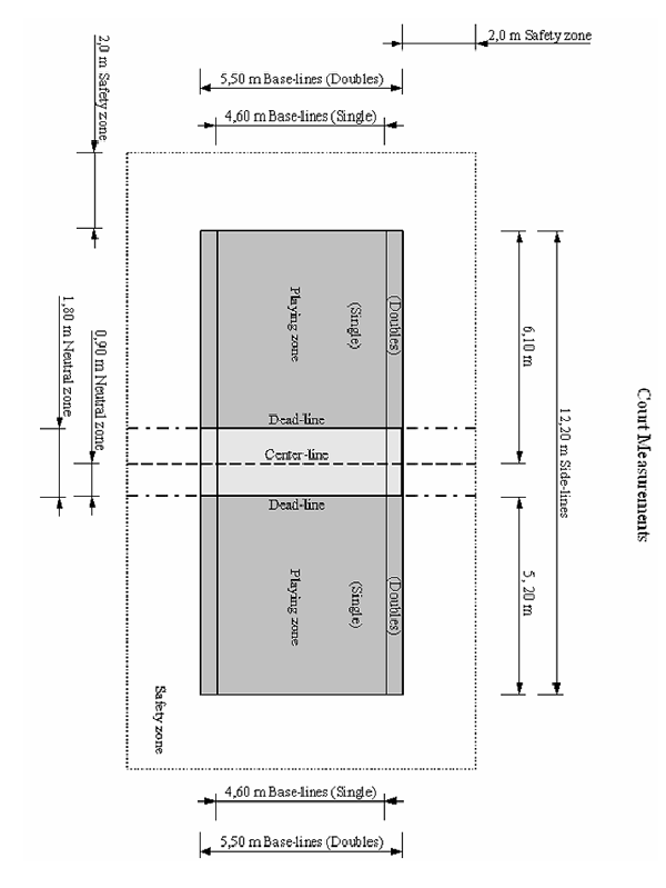 internationales Spielfeld beim Ringtennis